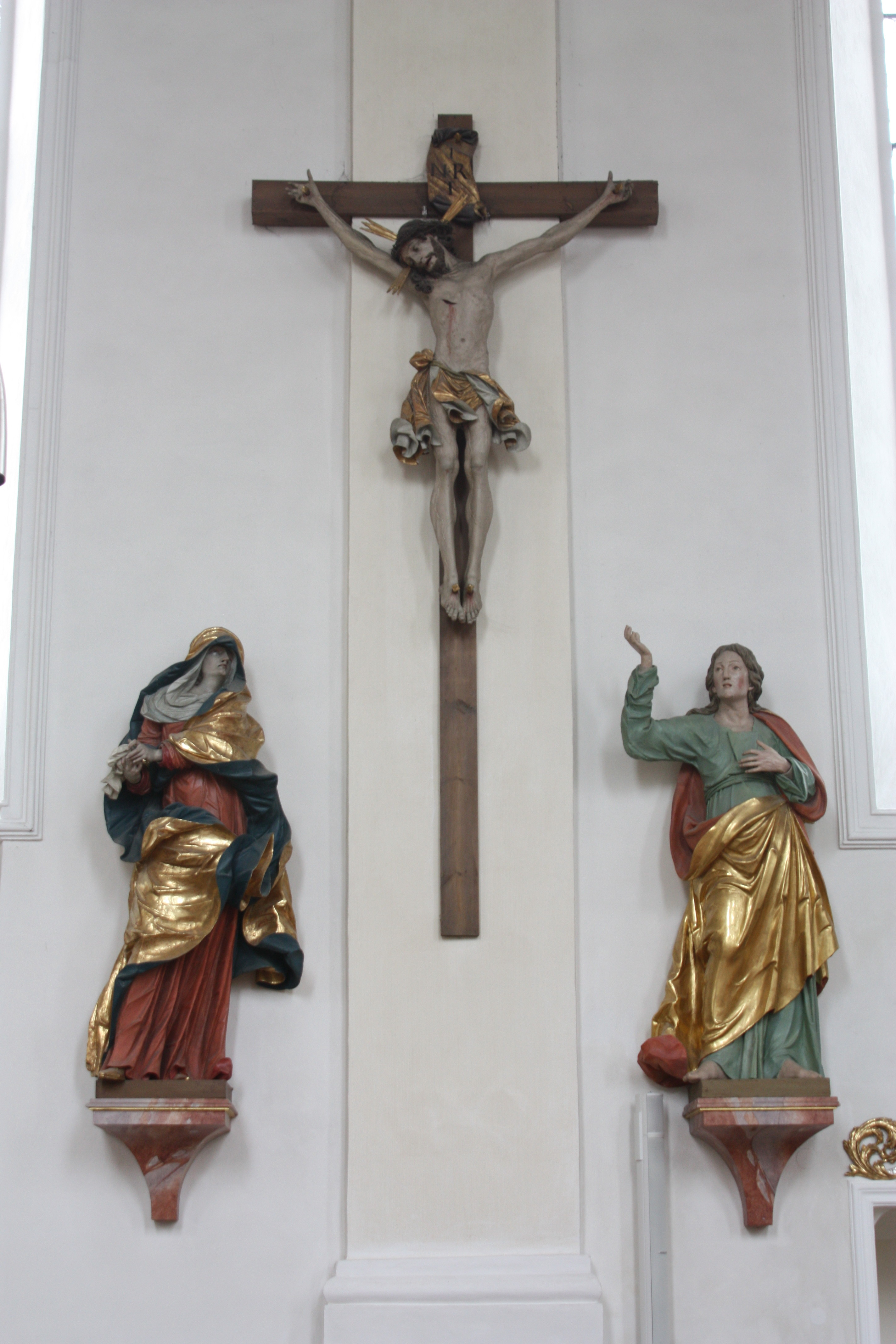 St. Michael, Kreuzigungsgruppe, Anf. 18. Jh.